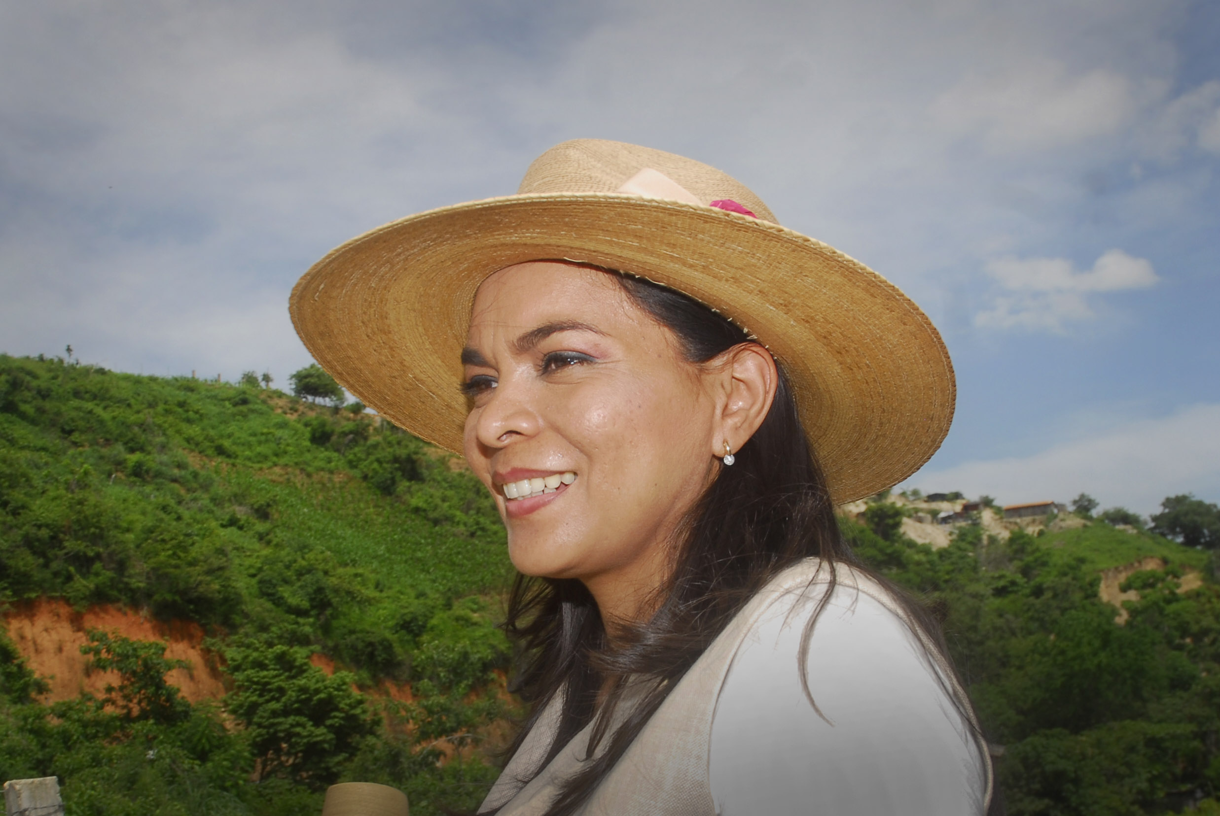 Beatriz Mojica Morga Campo